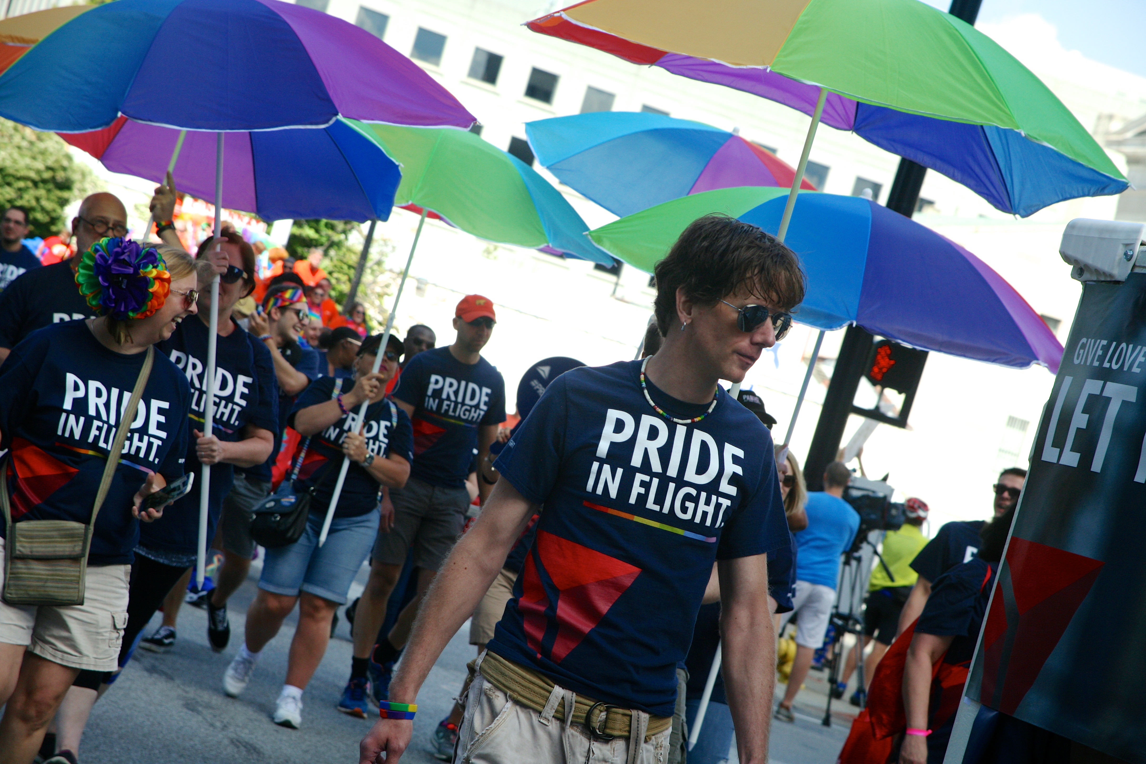 Delta employees participate in Cincinnati Pride.